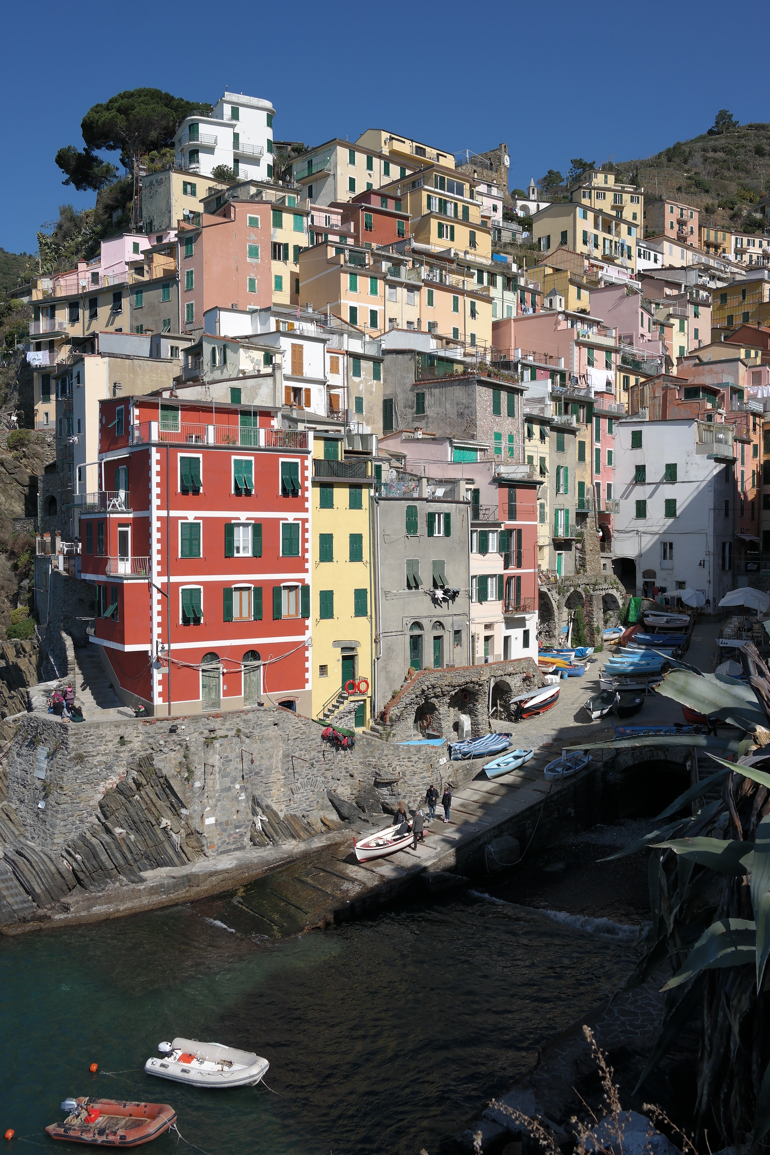 Veduta della Marina di Riomaggiore